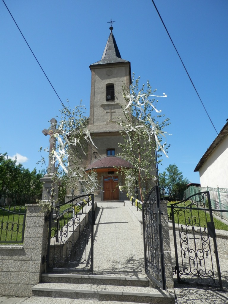 Obec Vislanka. Okres Stará Ľubovňa.